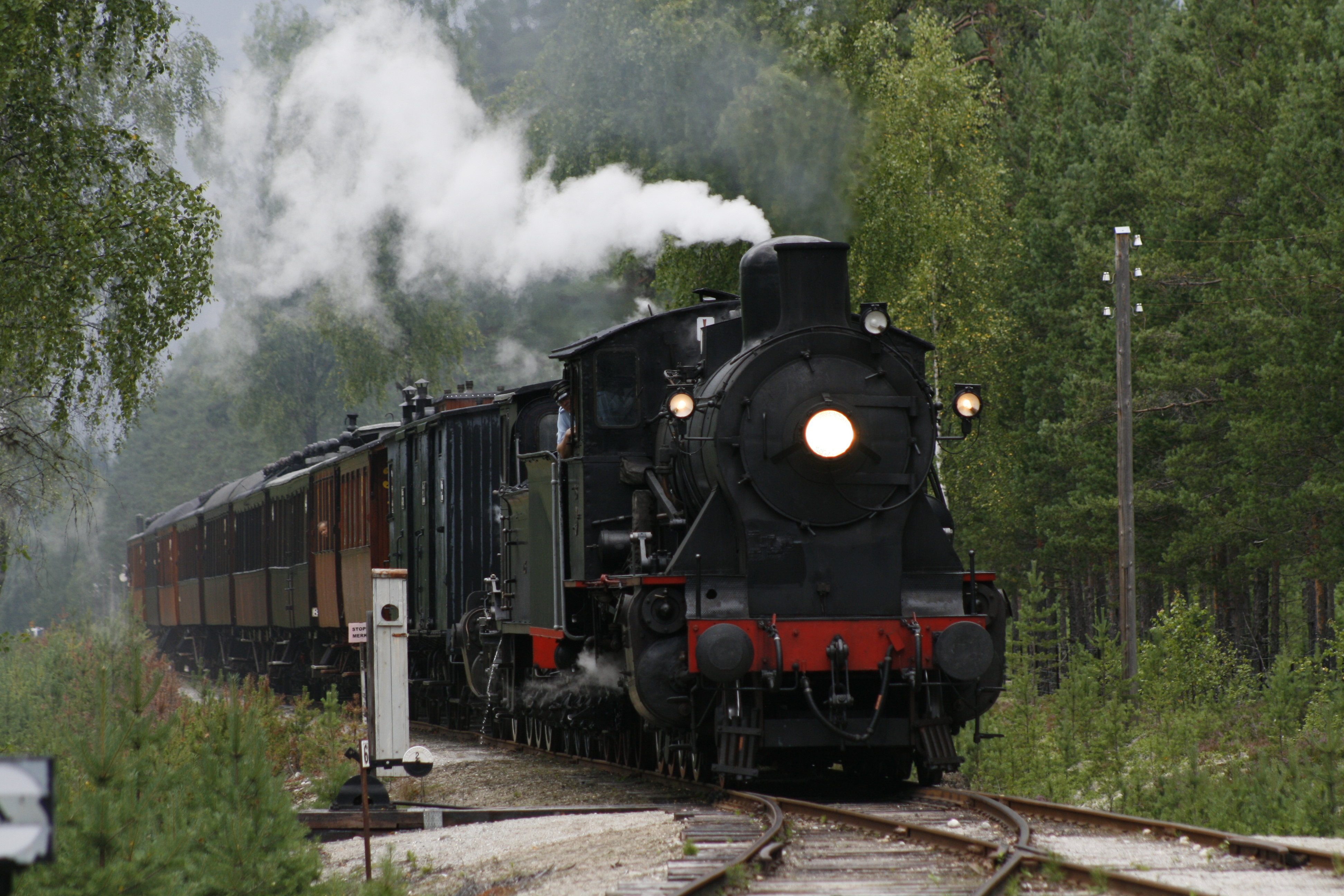 Krøderbanens tog kjører inn på Kløftefoss stasjon sommeren 2012